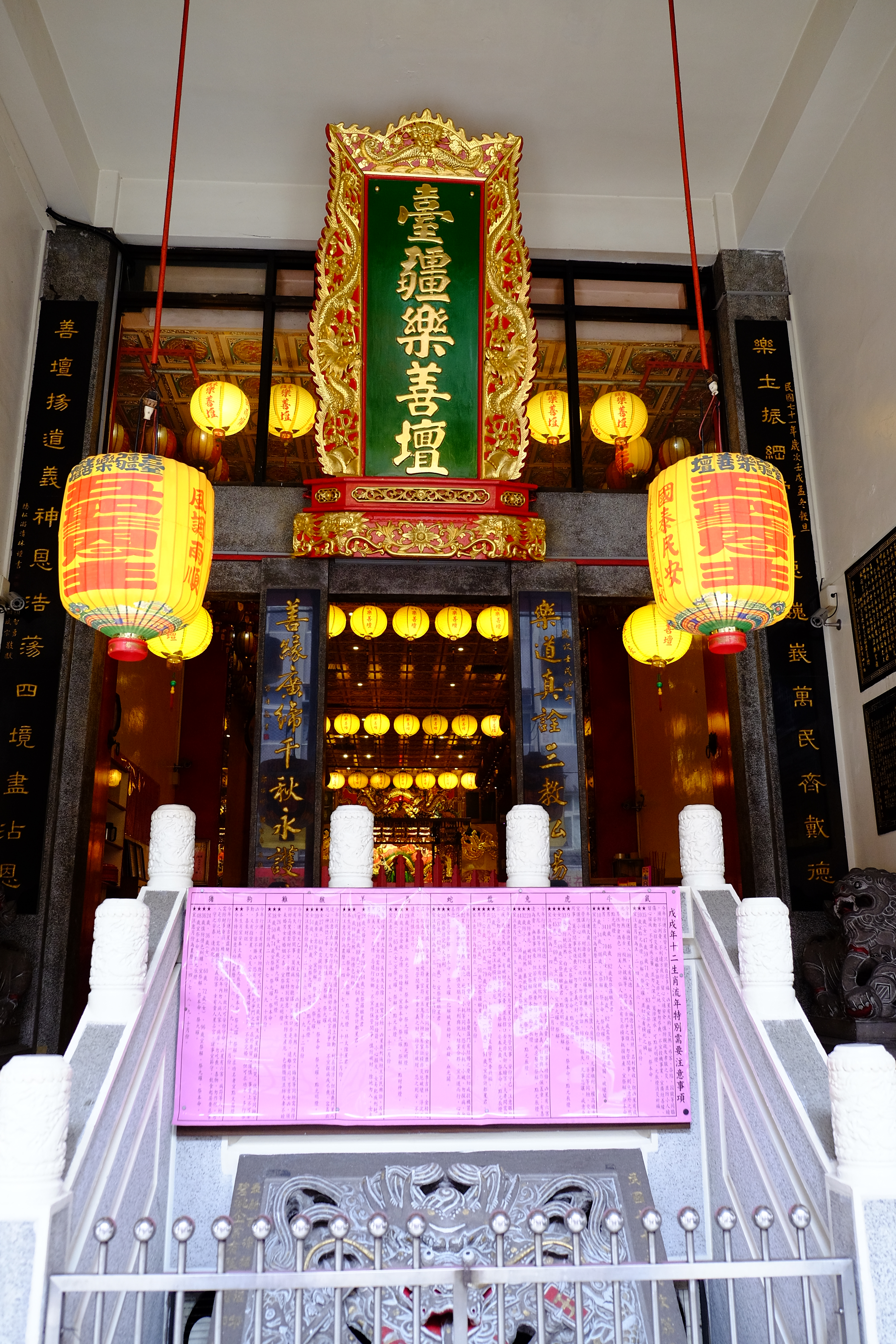 TaiJiangLeShan Temple 2018 台疆樂善壇 一樓入口 2018